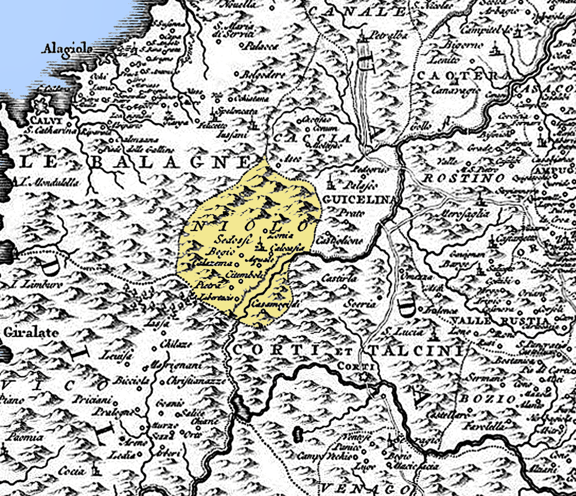 Extrait de la Nouvelle carte de l'isle de Corse apartenante a la republique de Genes, presentement divisée et soulevée, sous les ordres du baron de Neuhoff, élu roy sous le nom de Theodore Premier / levé sur les lieux par le capitaine I. Vogt 1737, concernant la piève de Niolo. Colorisation de la piève de Niolo.